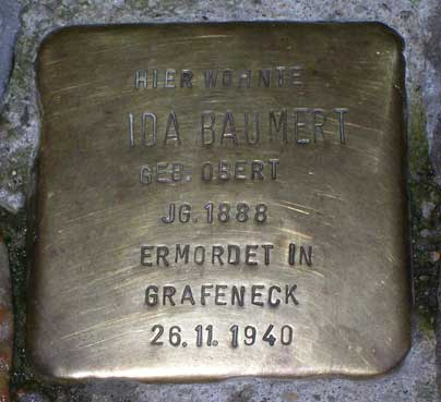 "Stolperstein" für Ida Baumert (geb. Obert)